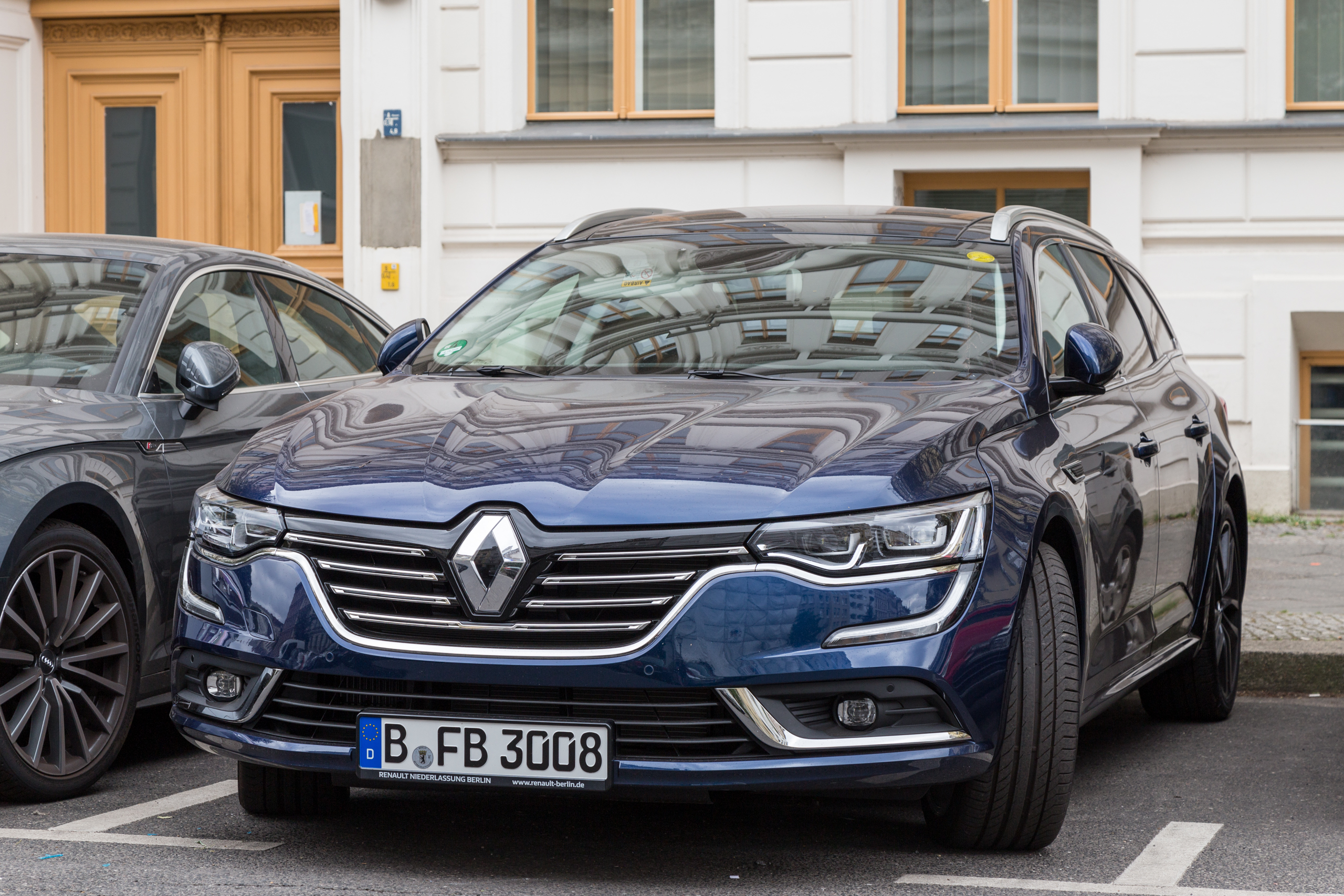 Renault Talisman Grandtour